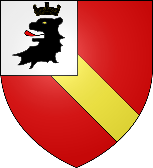 Blason de la commune de Maintenon